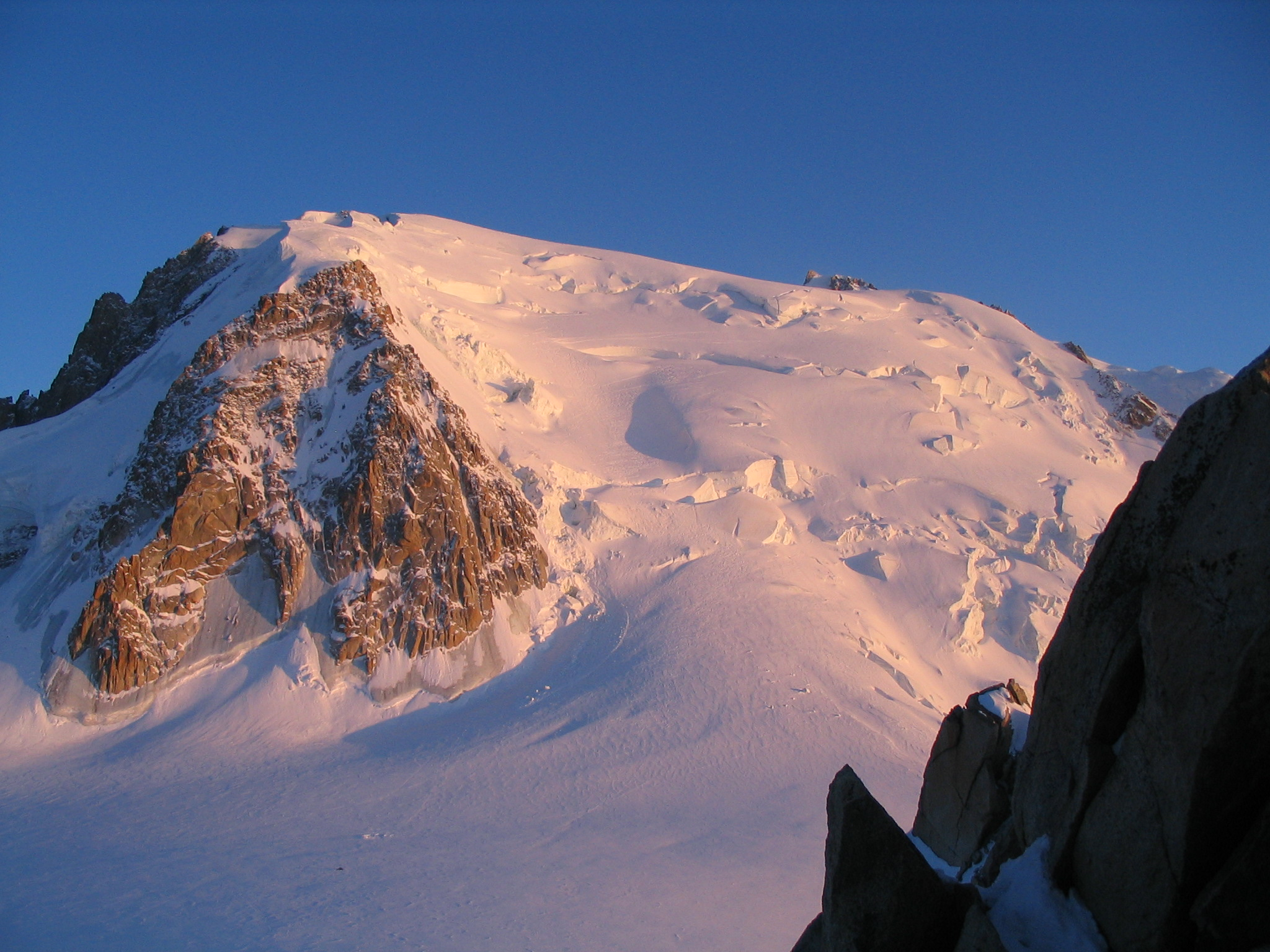 Coucher de soleil sur la face nord du mont Blanc du Tacul depuis le refuge des cosmiques, avril 2006 Licensing Catégorie:Sommet des Alpes françaises Catégorie:Massif du Mont-Blanc Catégorie:Montagne